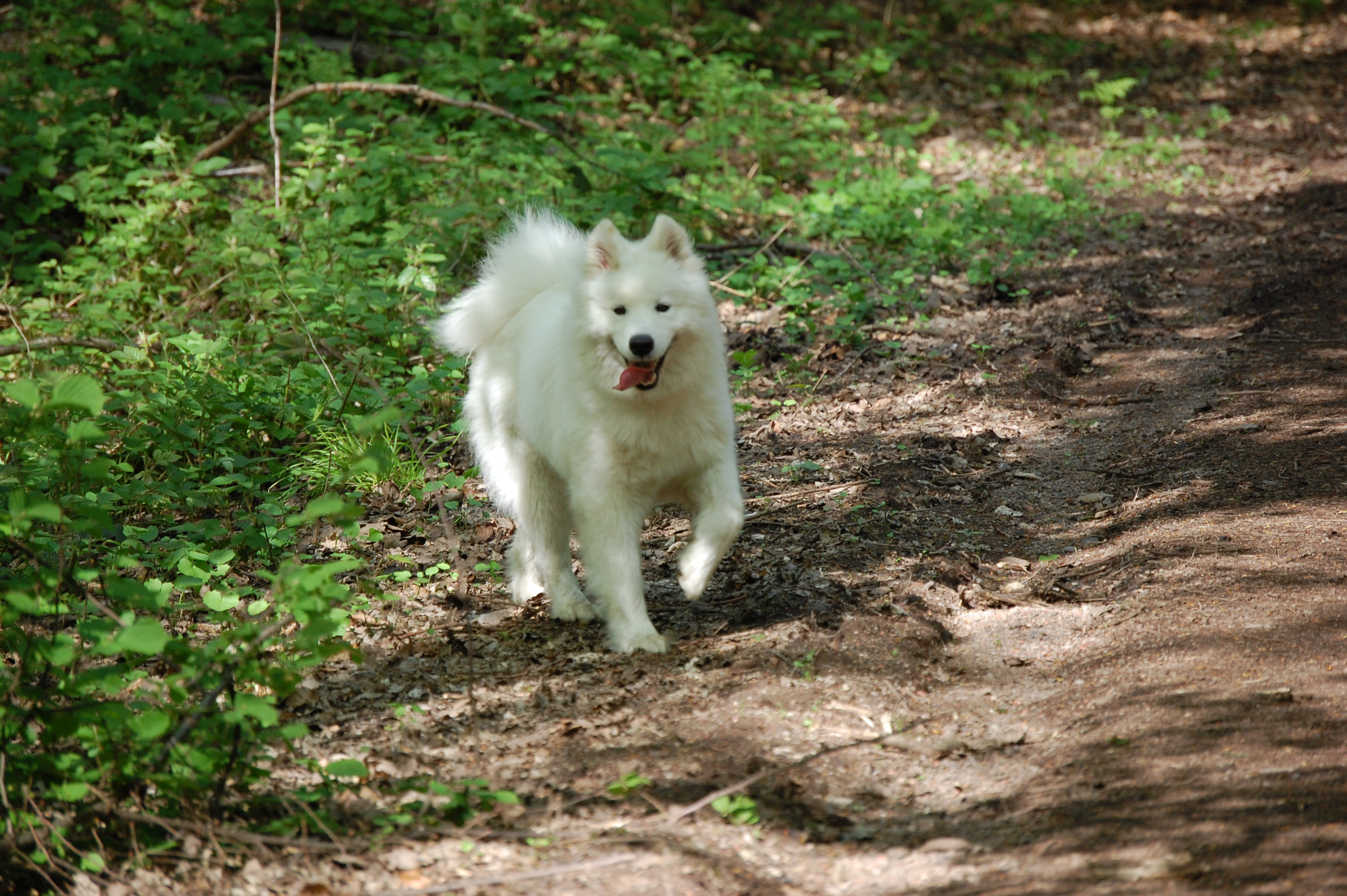 Femelle Samoyède de 2 ans, Be-Bop Bohême of Karasea, producteur: A. Flamand, propriétaire: M. Guzu